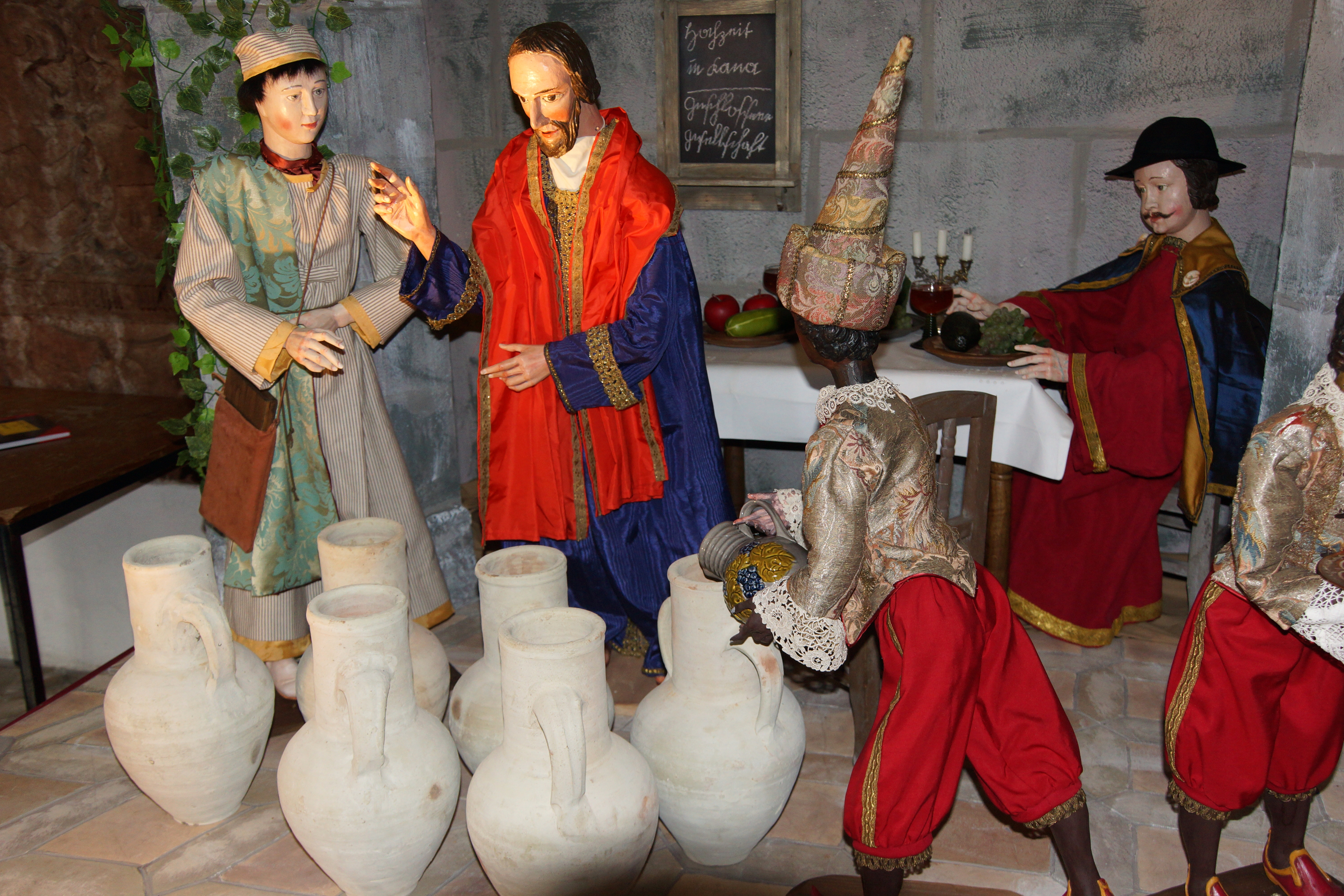 Die Jahreskrippe im Münster St Johannes in Neumarkt in der Oberpfalz: Die Hochzeit zu Kana